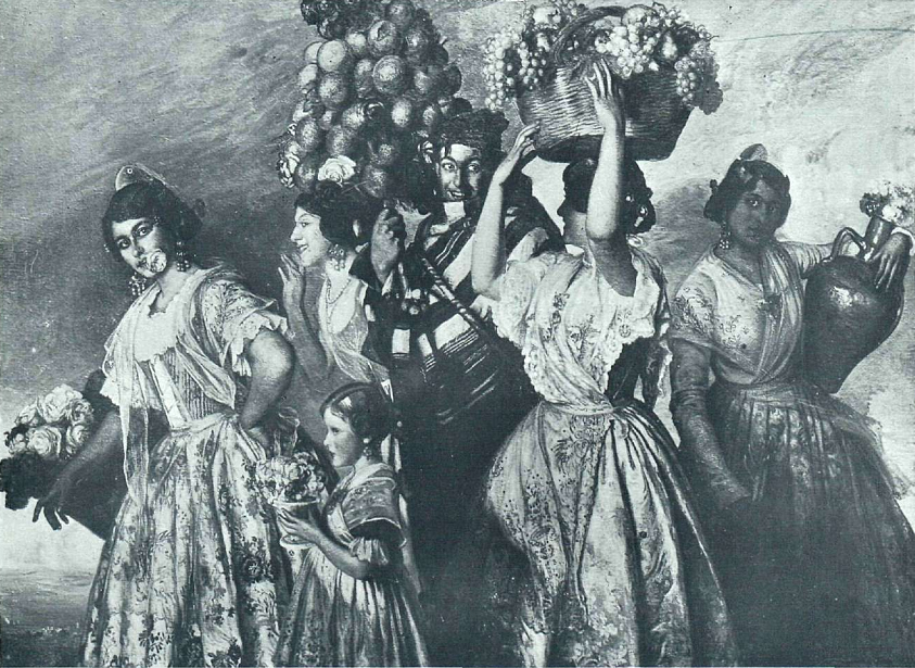 Floreal, obra del pintor José Pinazo Martínez, recogido en la revista española La Esfera.